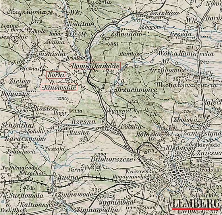 карта 1910 рік